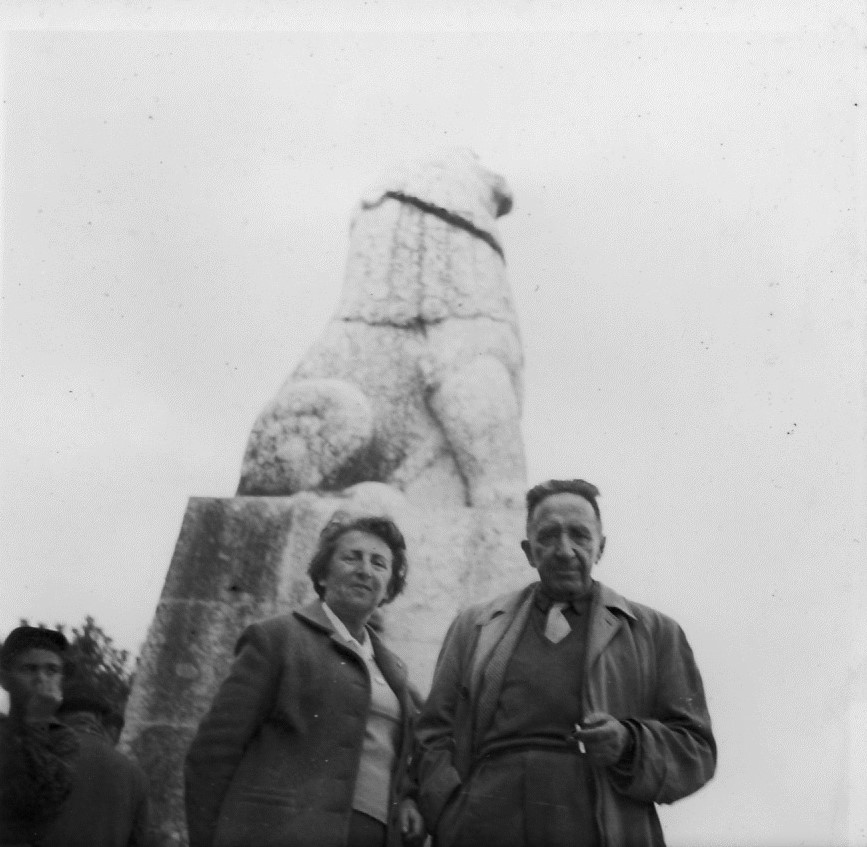 זלמן ופולה בלחובסקי לצד האריה השואג, בית הקרבות כפר גלעד,תל-חי